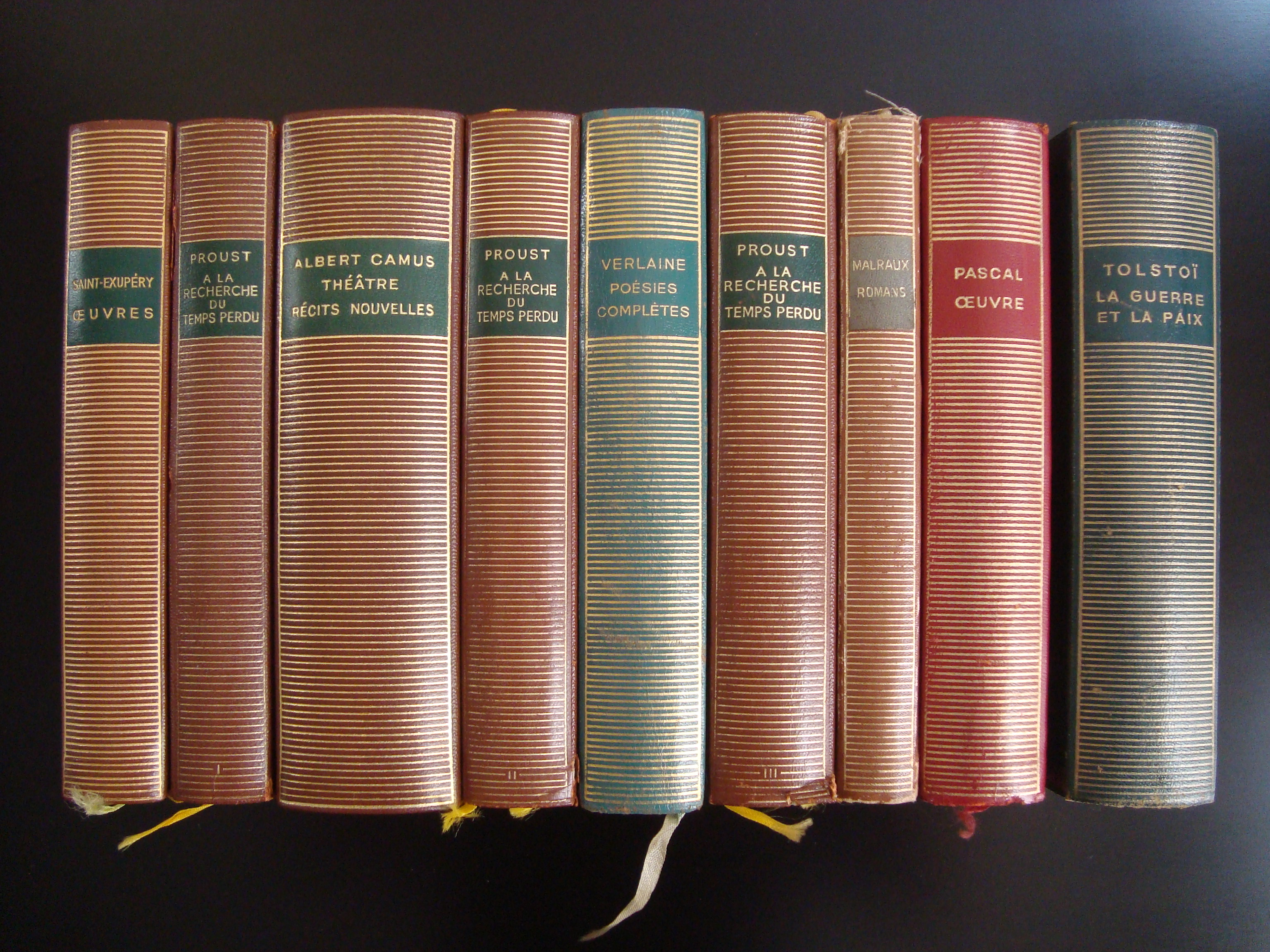 Neuf des 10 volumes les plus édités dans la Bibliothèque de la Pléiade